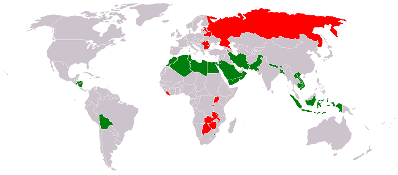 Evolution de l'espérance de vie dans le monde entre 1978 et 1998 : en vert les pays dont l'espérance a augmenté de plus de 10 ans durant cette période, en rouge, ceux pour lesquels elles à diminué.